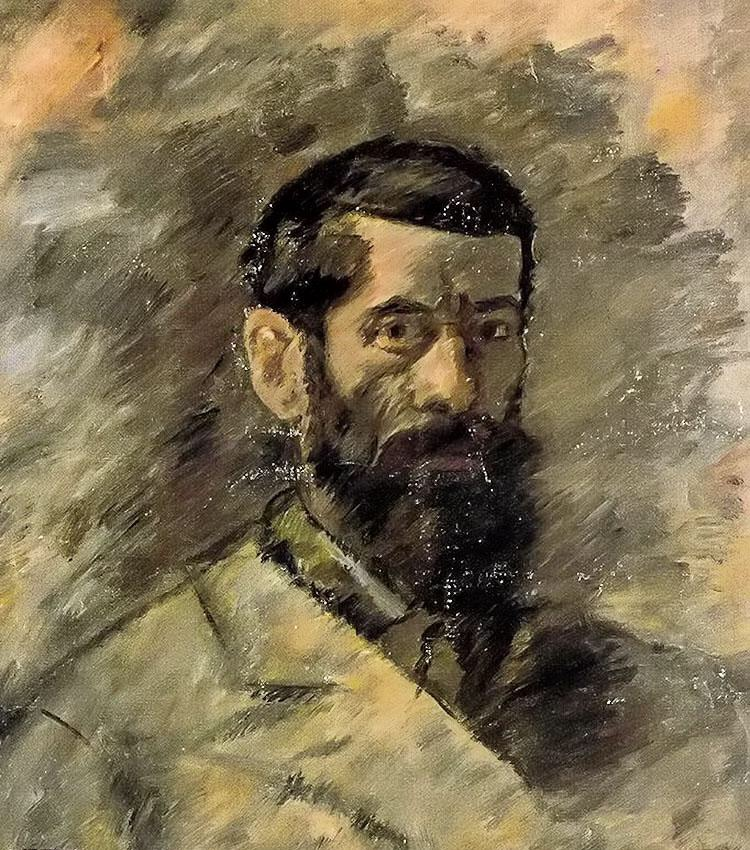 Self-portrait